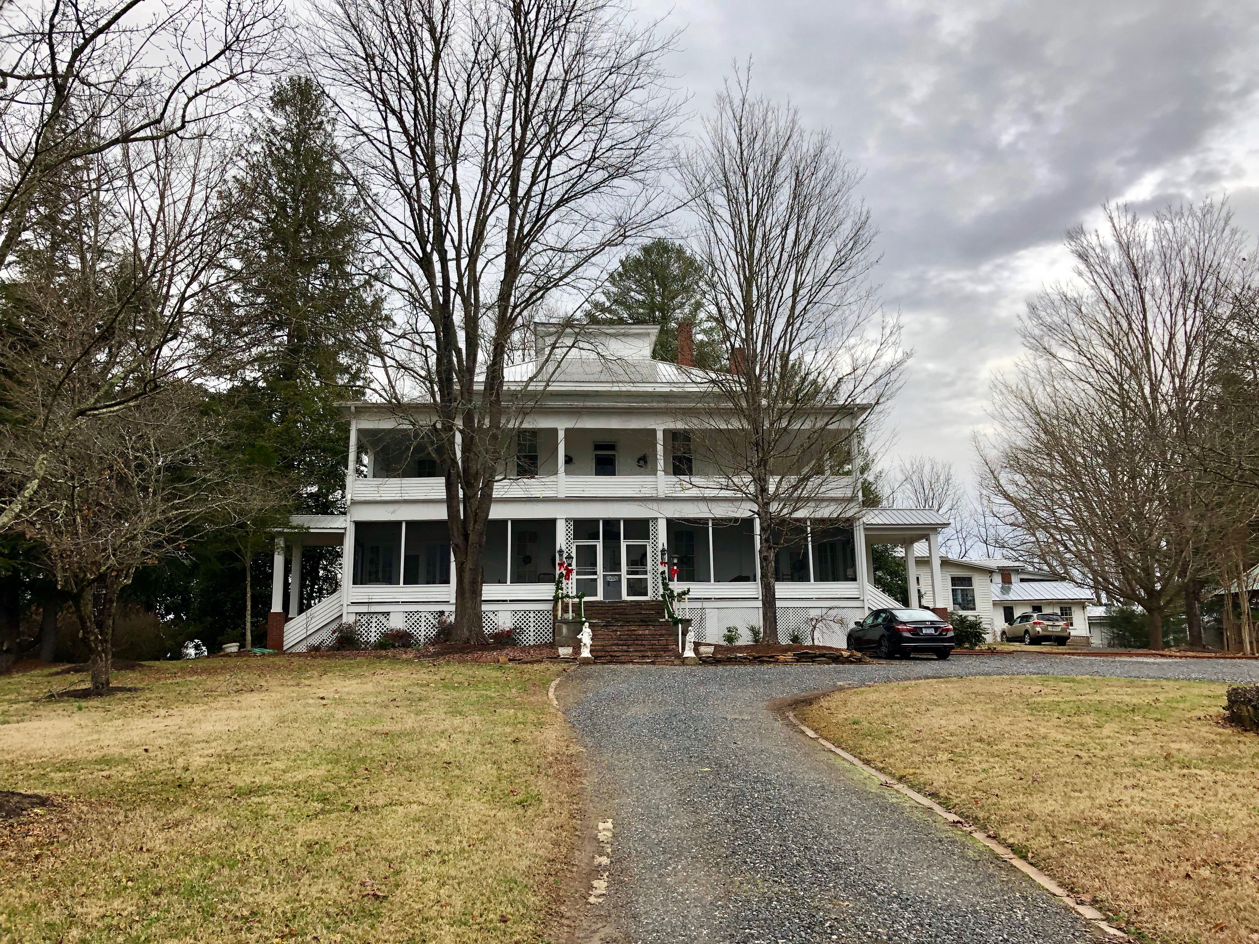 Franklin Academy/Franklin Terrace Inn, Franklin, NC